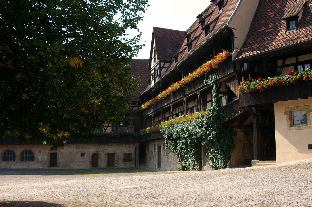 Bamberg - Alte Hofhaltung - Innenhof